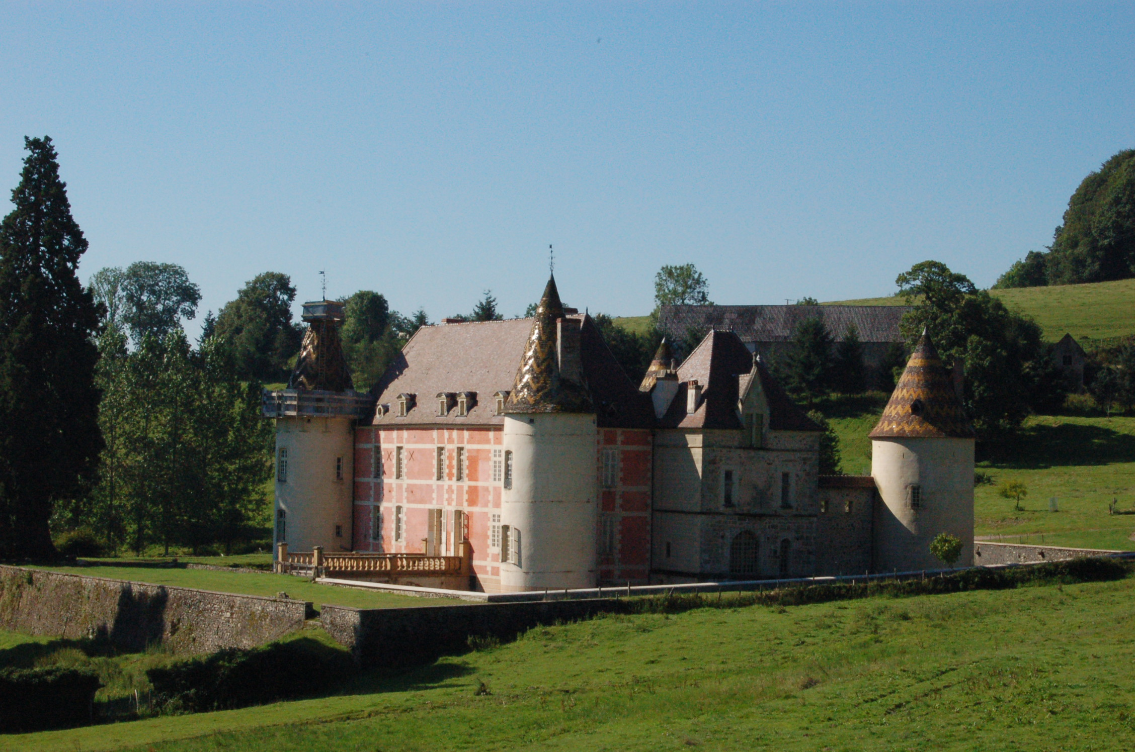 Château de Ménessaire (Côte d'Or, Bourgogne)